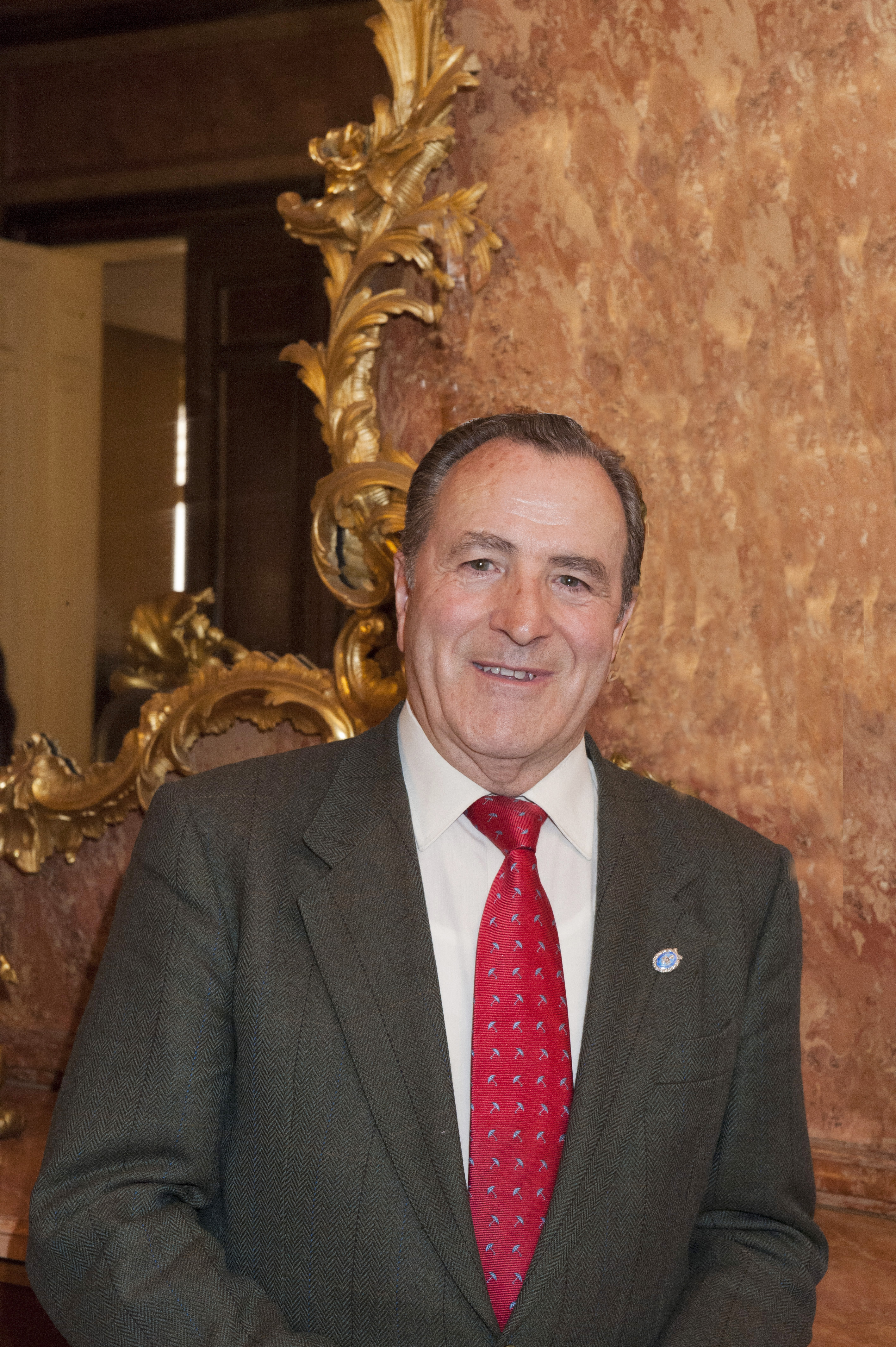 Lopez Gomez, Ingeniero e Inventor